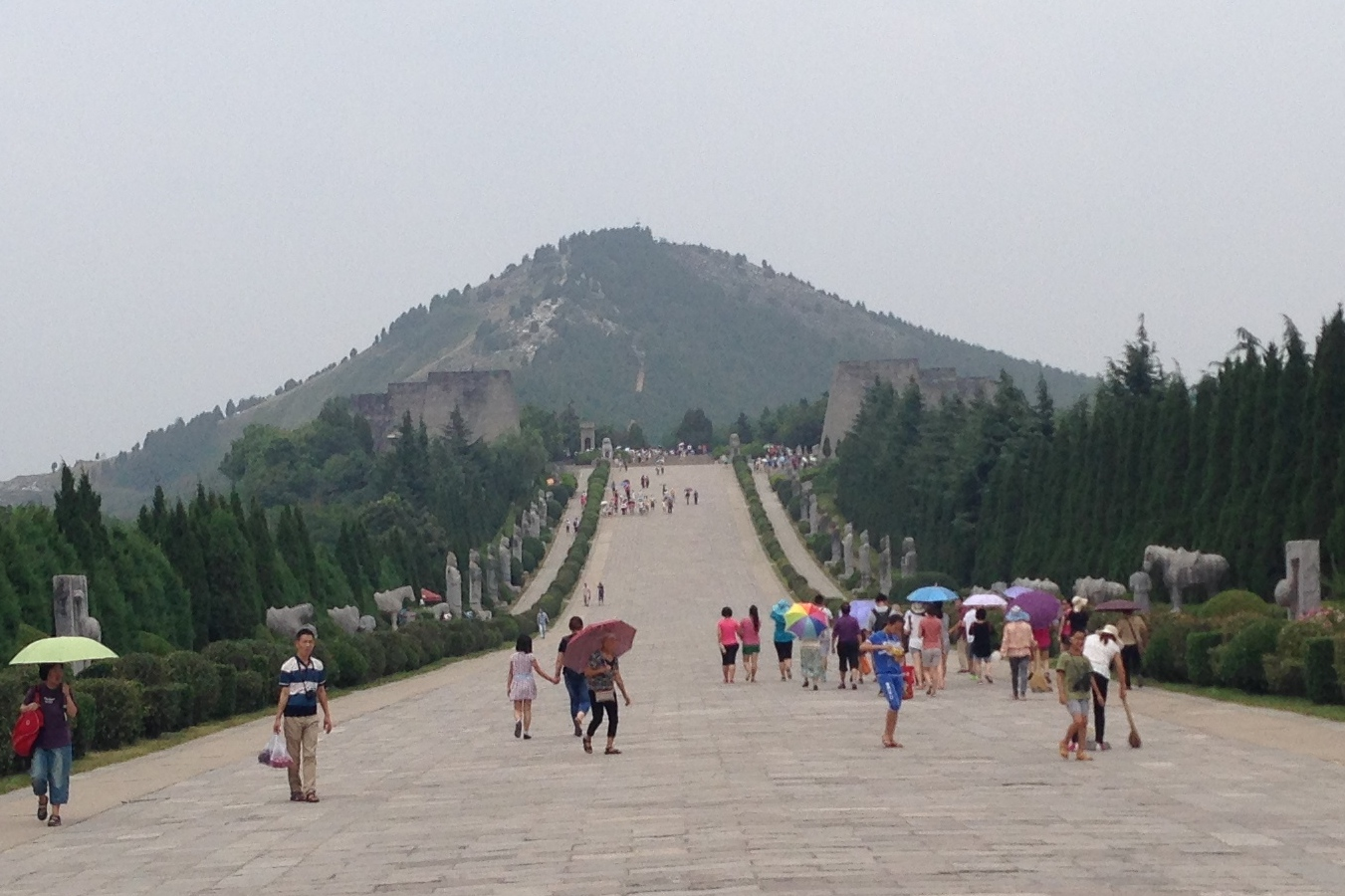 Liangberget vid Qianling